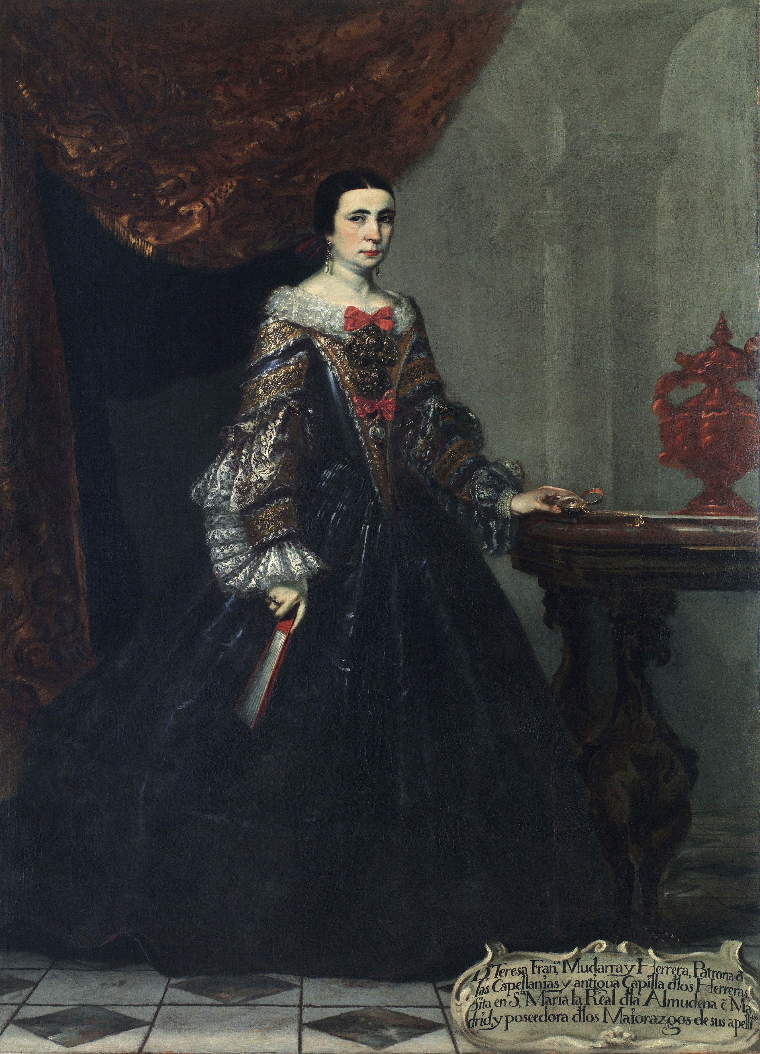 Retrato de doña Francisca de Mudarra, óleo sobre lienzo, 210 x 145 cm, Bilbao, Museo de Bellas Artes (Sullivan, PD12; anteriormente atribuido a Carreño)